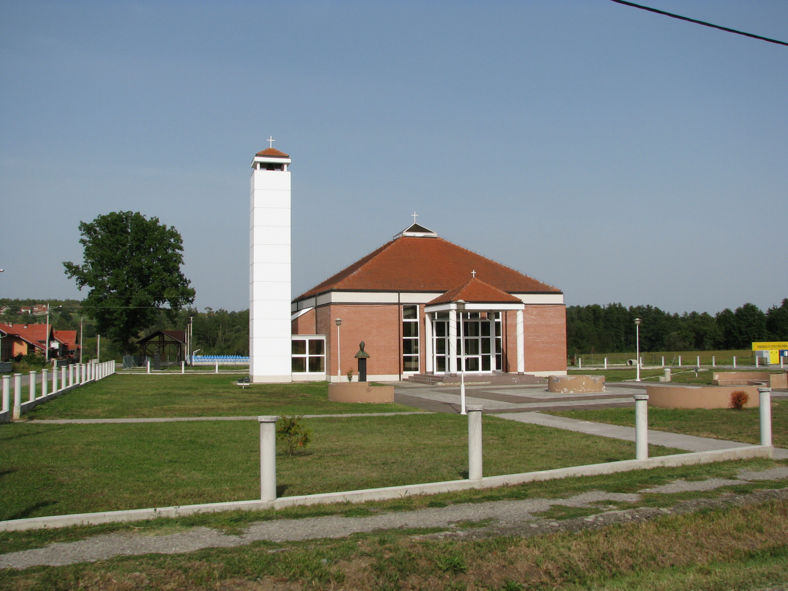 Crkva u Donjim Kukuruzarima